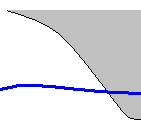 Etrave a Guibre